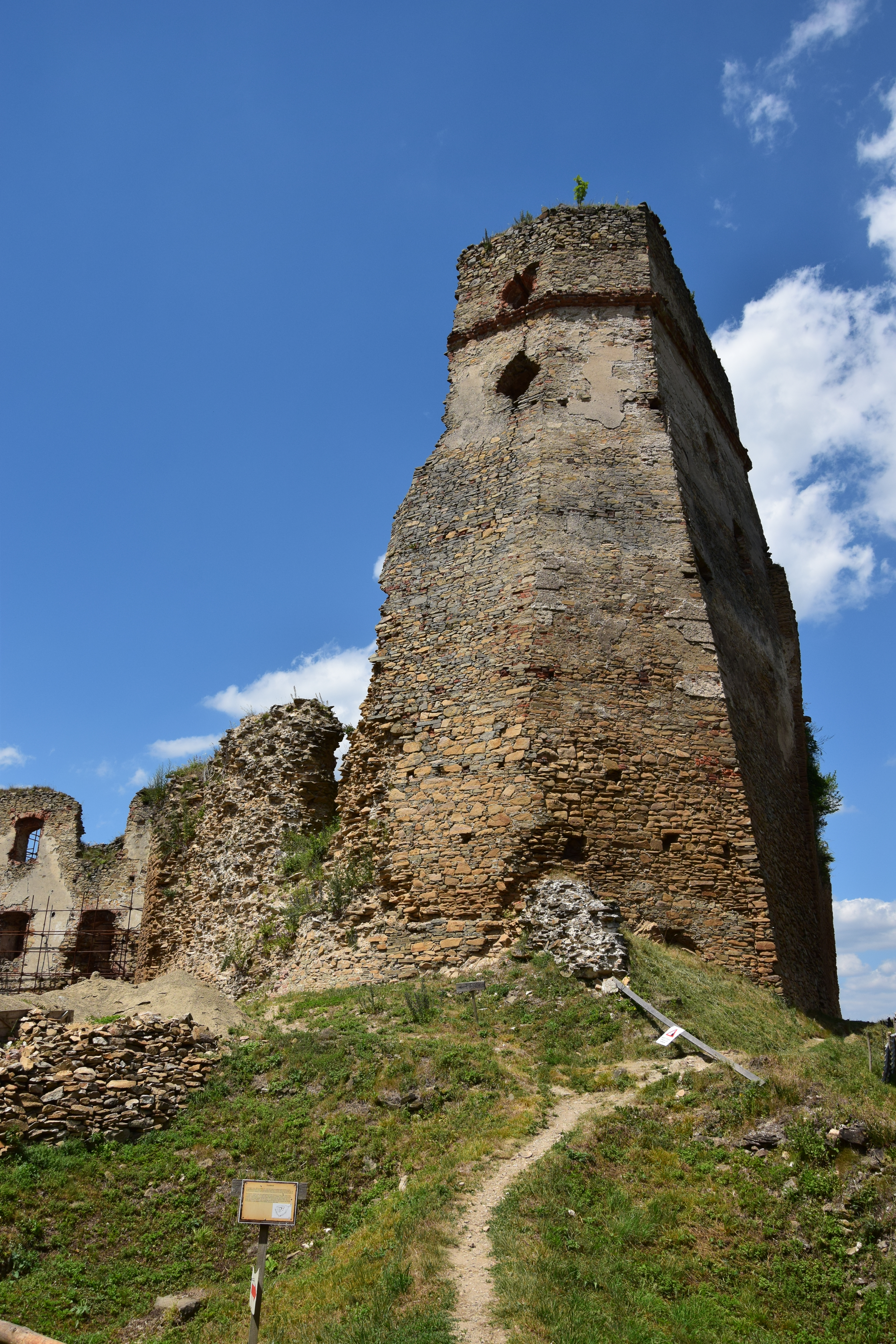 Zborov – velká věž v horním hradě